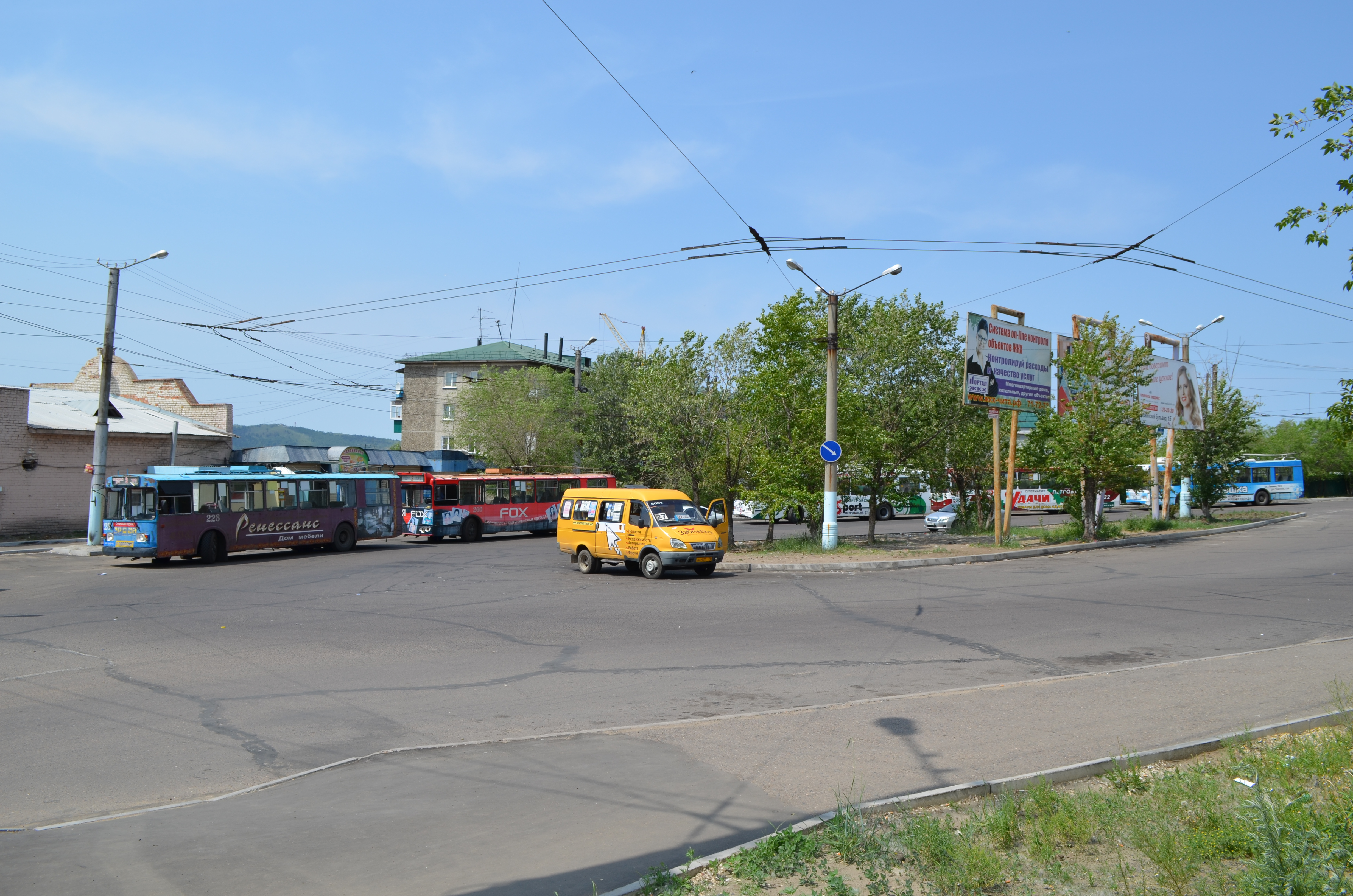 Снимки конца июня - начала июля 2015 г. Конечная остановка троллейбусов "Сосновый Бор".